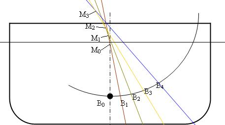 Eigen ontwerp.